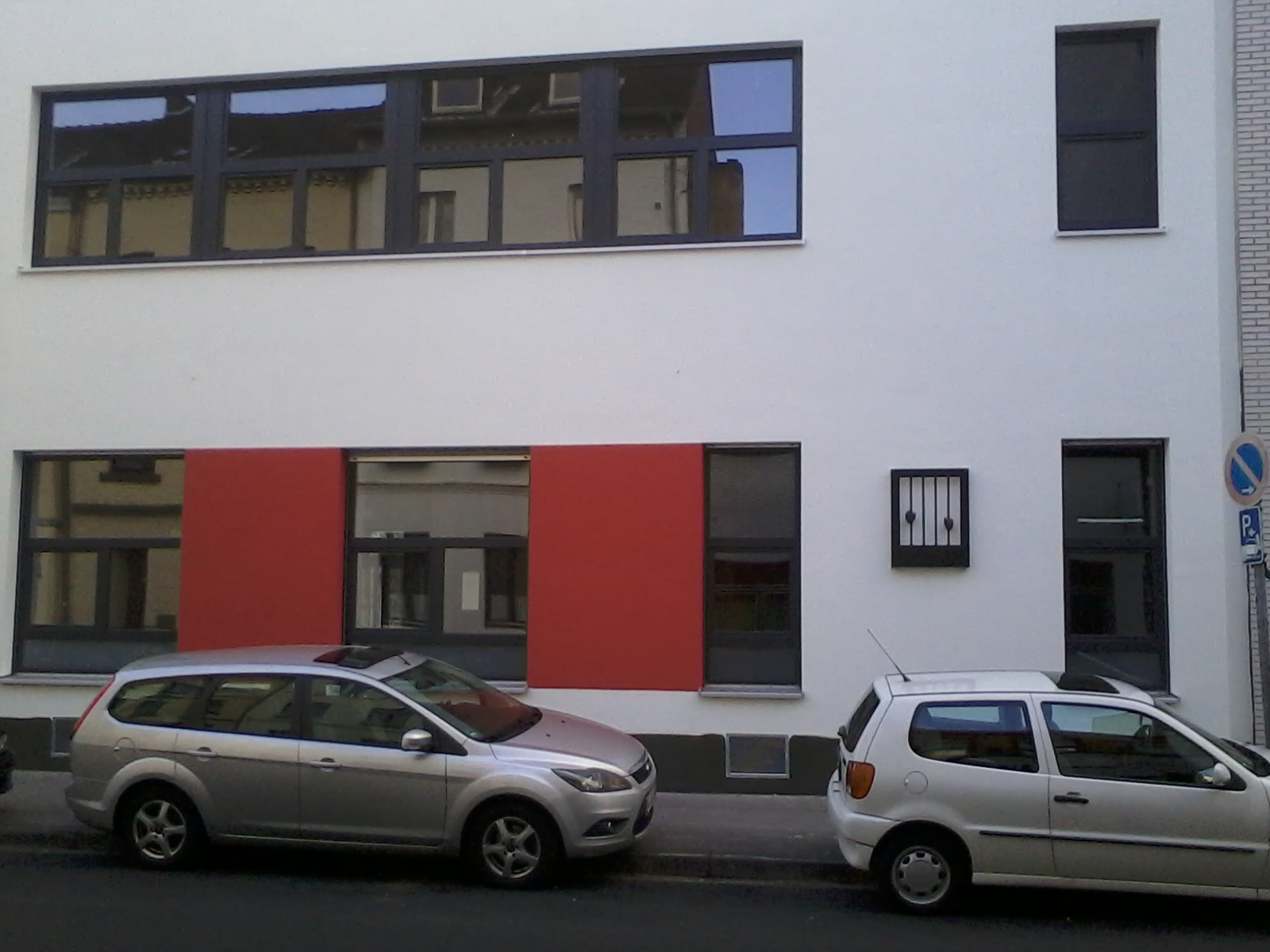 Ehemaliges Jugendzentrum Sülz mit Zwngsarbeiterdenkmal